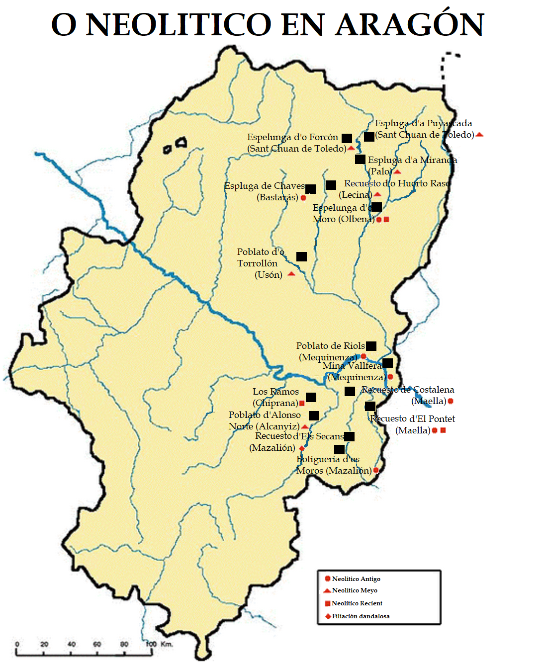 Aragonés: O Neolitico en Aragón